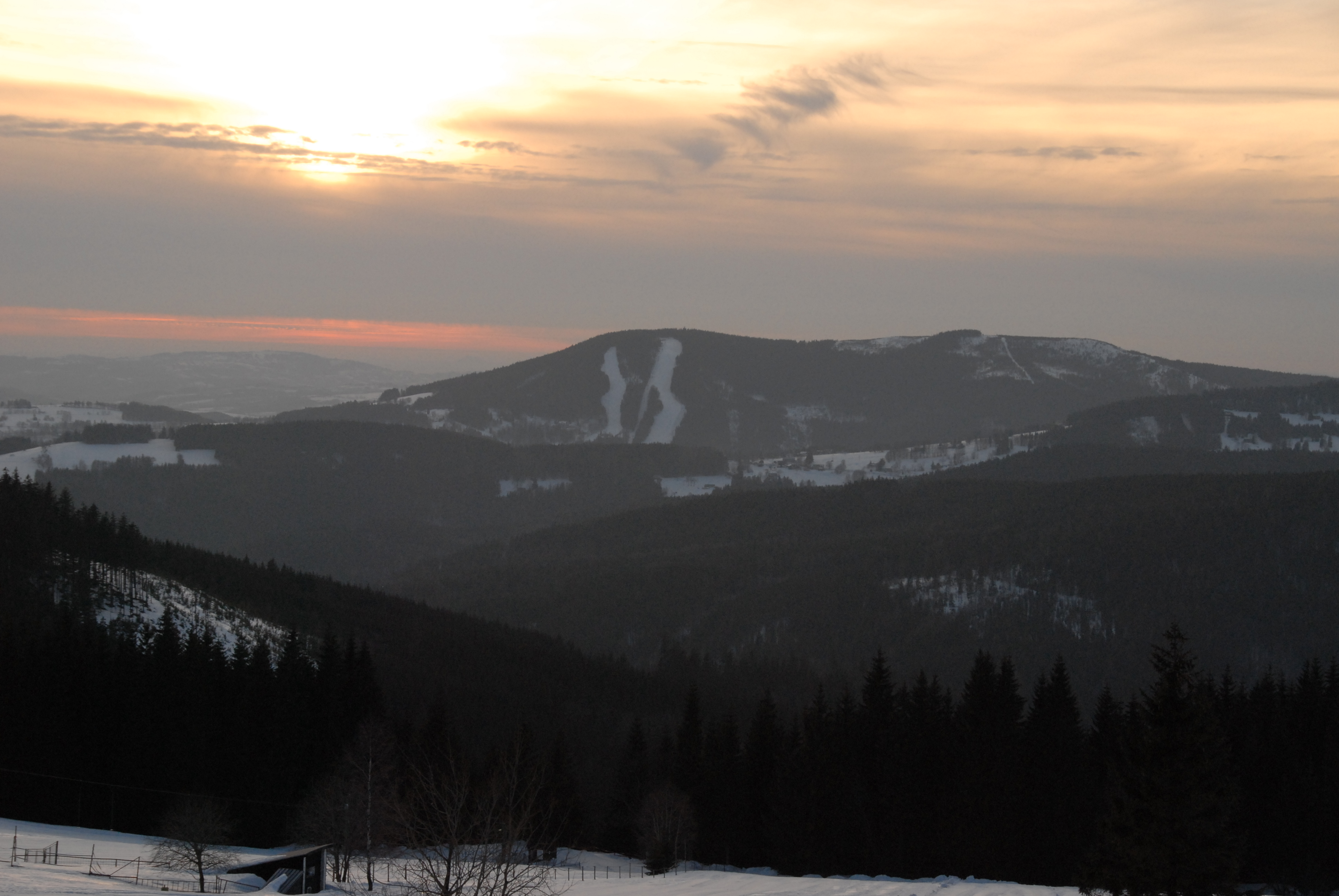 Pohled od Tetřevích bud na Přední Žalý (1018 m.n.m.) a tamější herlíkovické sjezdovky, vedle něho Zadní Žalý (1035 m.n.m.), před nimi Strážná hůra (824 m.n.m.), Strážné a kousek Herlíkovického Žalý (958 m.n.m.), přes údolí naproti vrch o výšce 889 m.n.m.